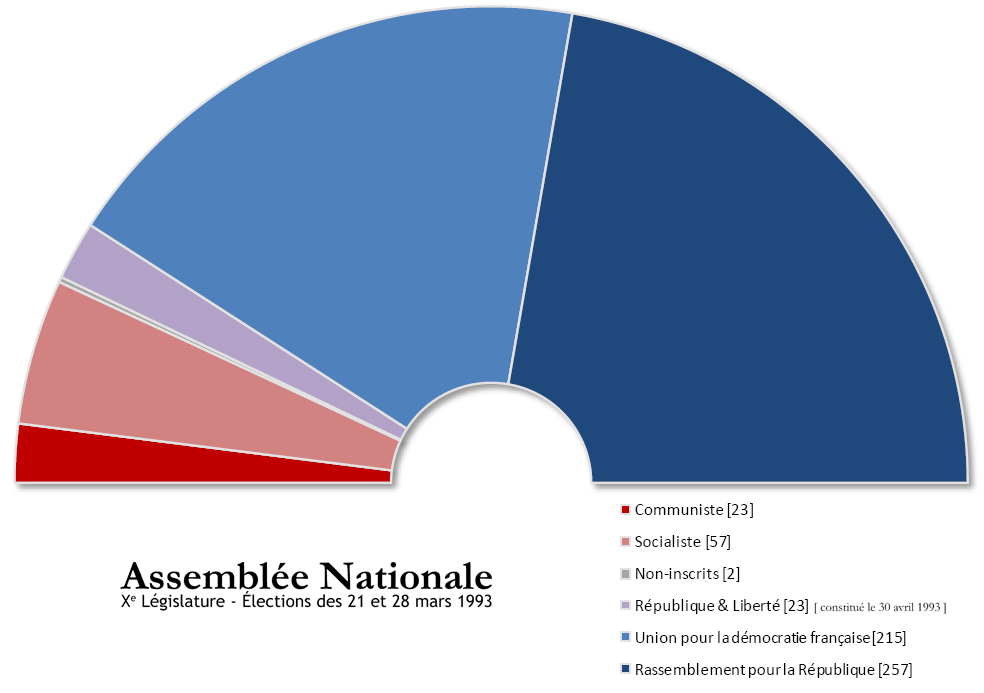 Assemblée Nationale française issue des élections de mars 1993